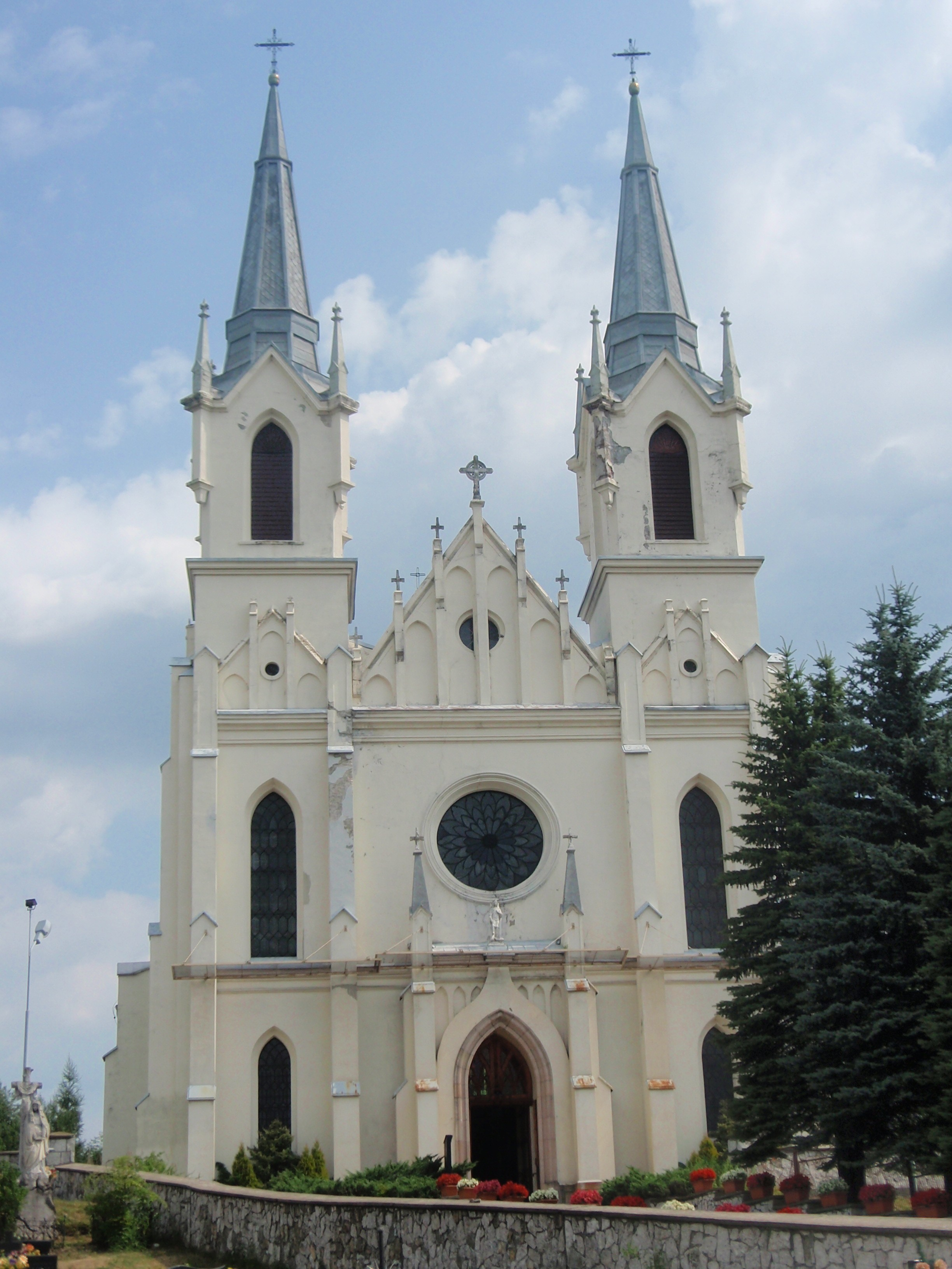 Kosciol rzymskokatolicki w Bolesławiu (powiat olkuski)